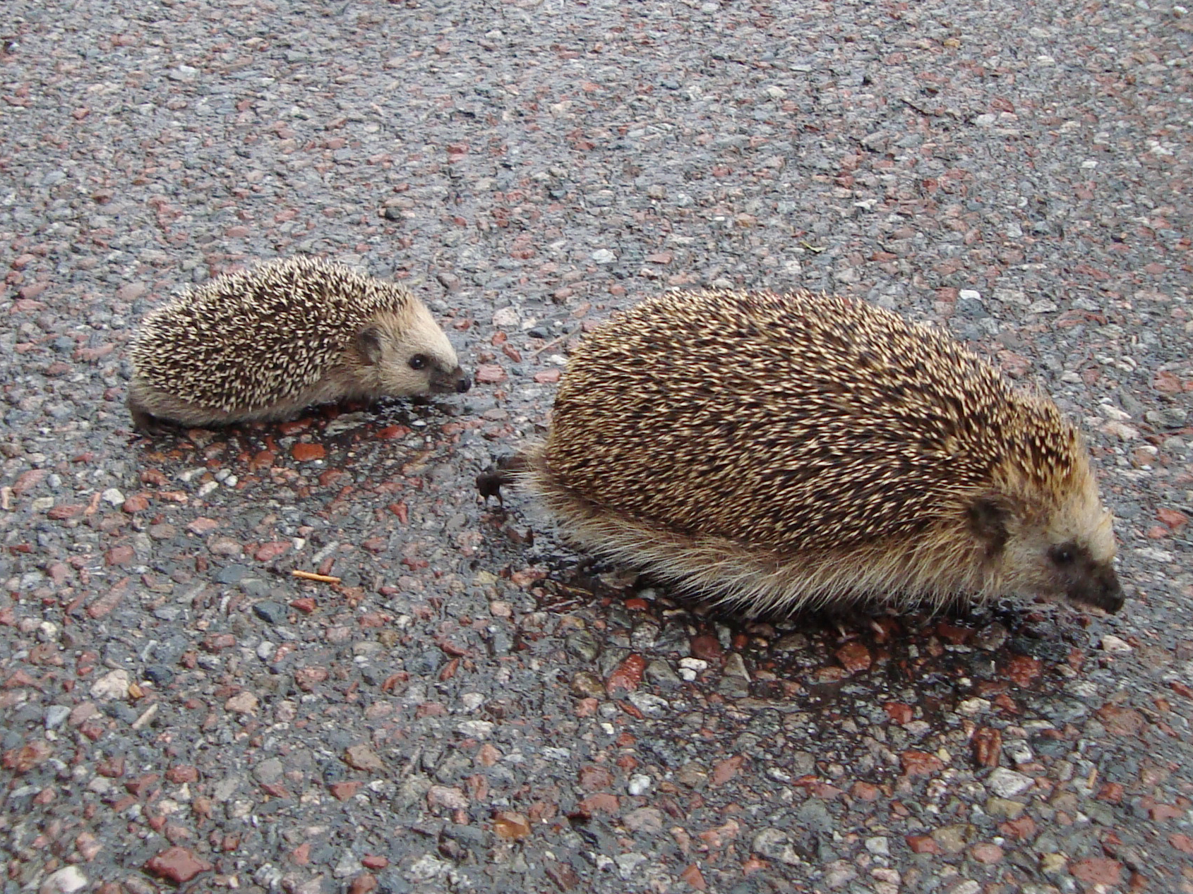 Erinaceus europaeus